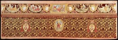 Museo dell'operta del duomo, prato, paliotto (XVI secolo)